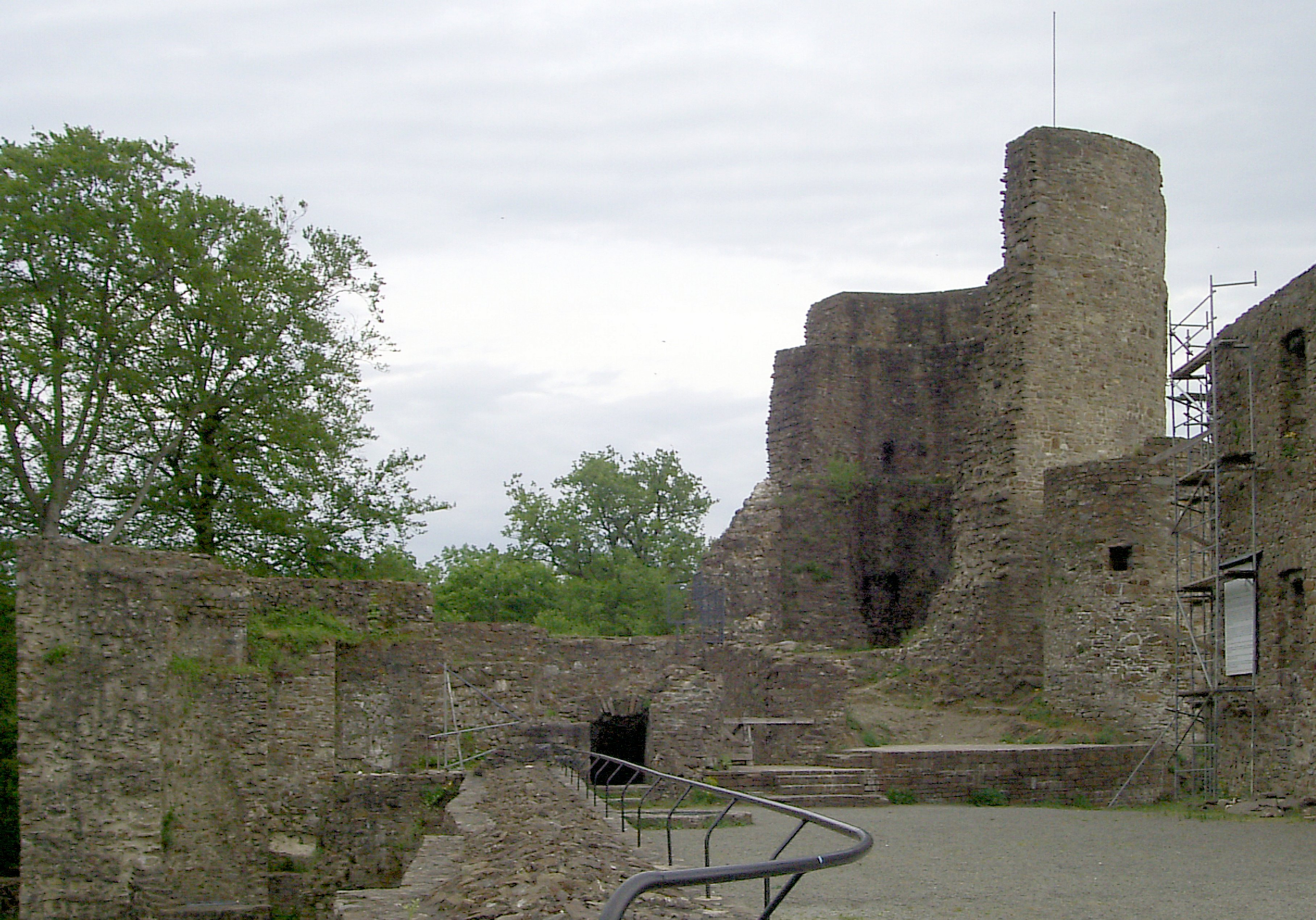 Plateau der Burg Windeck, Nordrhein-Westfalen, Deutschland